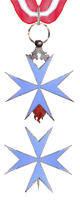 De Zweedse "Birgittinerriddarorden" Een bekende pseudo-orde Eigen tekening Robert Prummel 12 dec 2006 03:12 (CET)